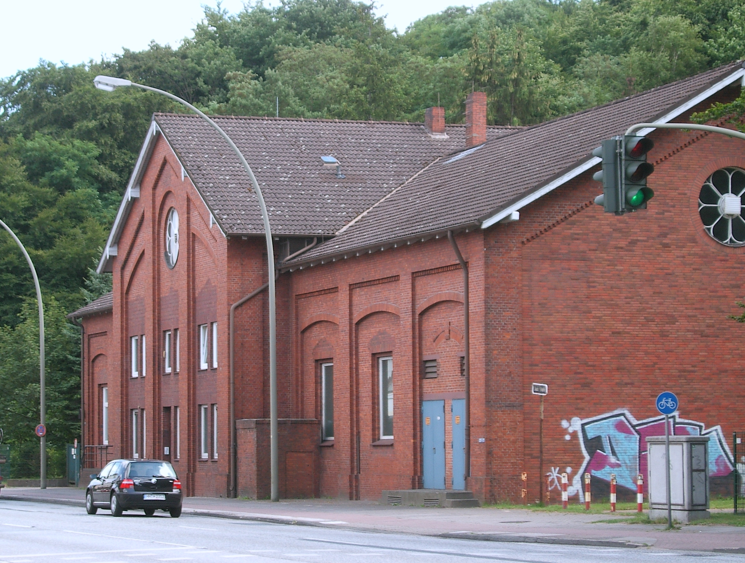 Bildbeschreibung: Hamburg, Bostelbek, Wasserwerk Fotograf: selbst Datum: 14.07.2006